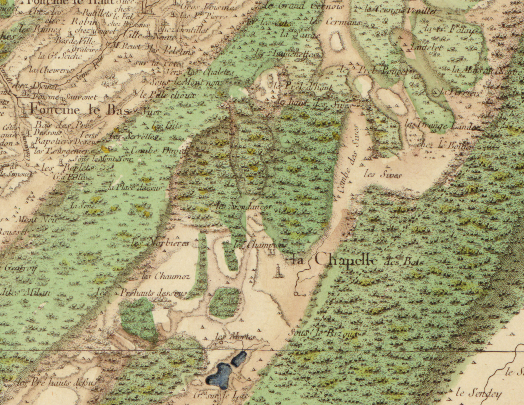 Carte de Cassini n°147 (Nozeroy, zoom sur Chapelle-des-Bois), 1759.